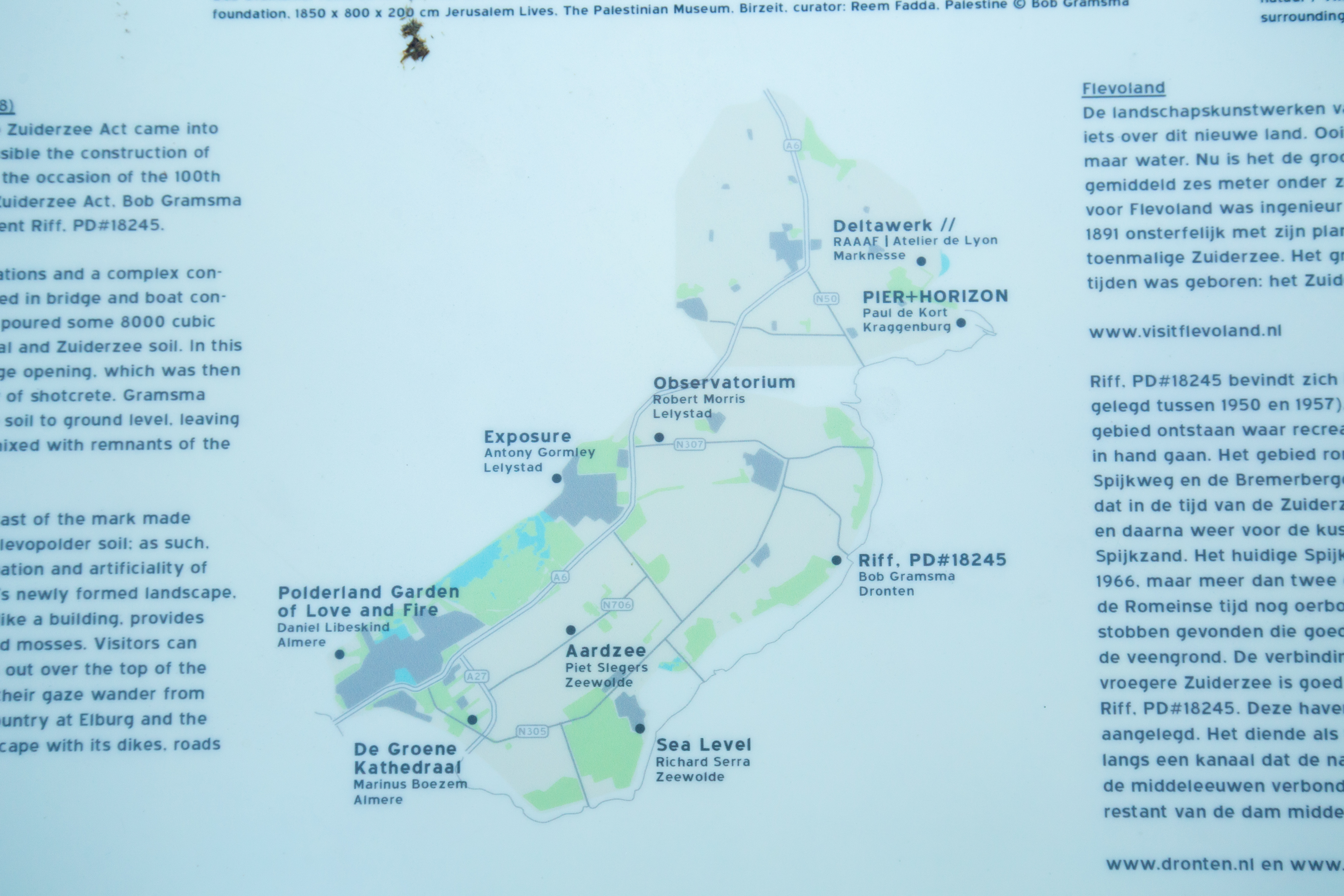 Kaart met een overzicht van de kunstwerken van Land Art Flevoland